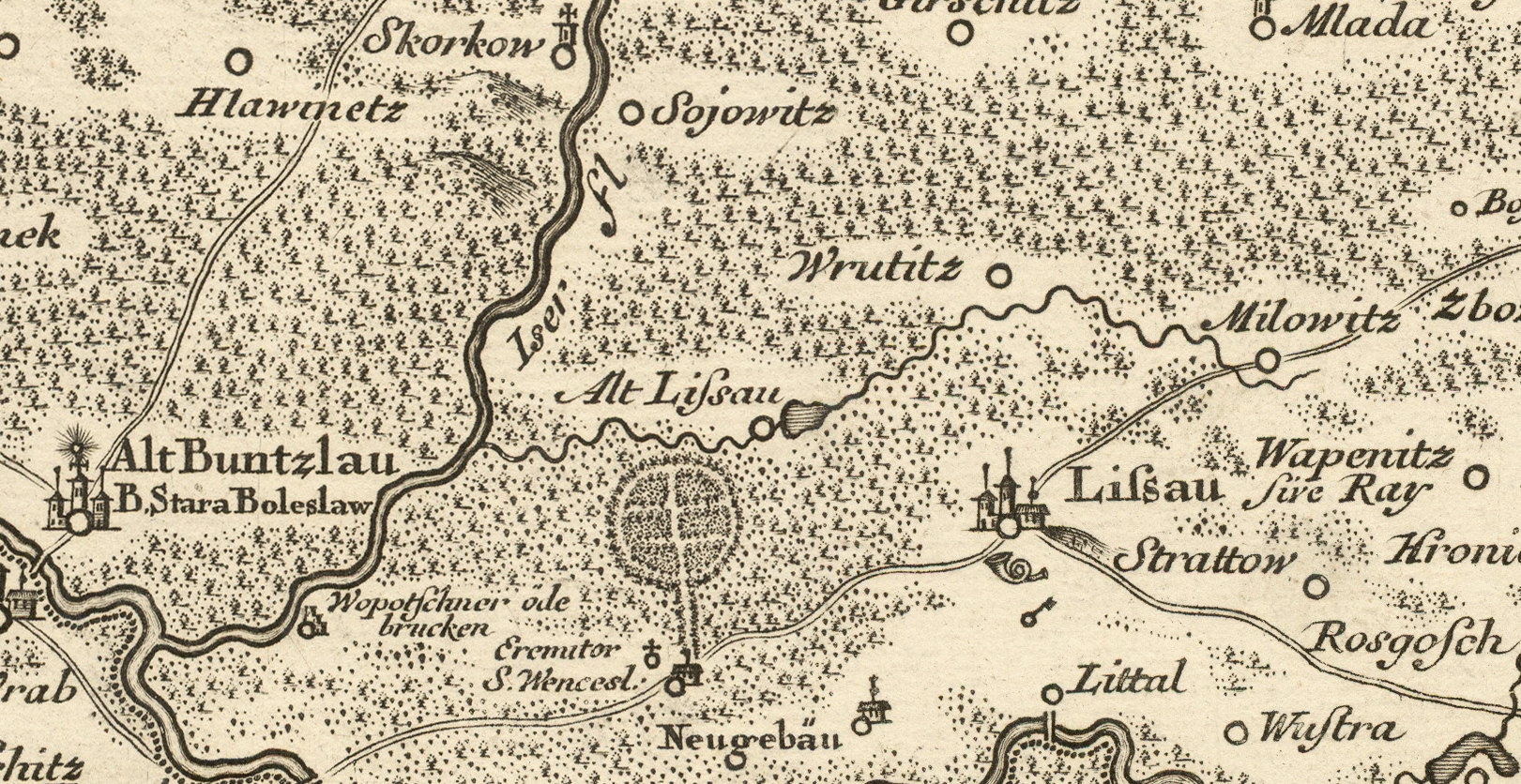 Stará Lysá na Müllerově mapě Čech z roku 1720. Mapová sbírka Historického ústavu AV ČR na CD-ROM, sekce VIII